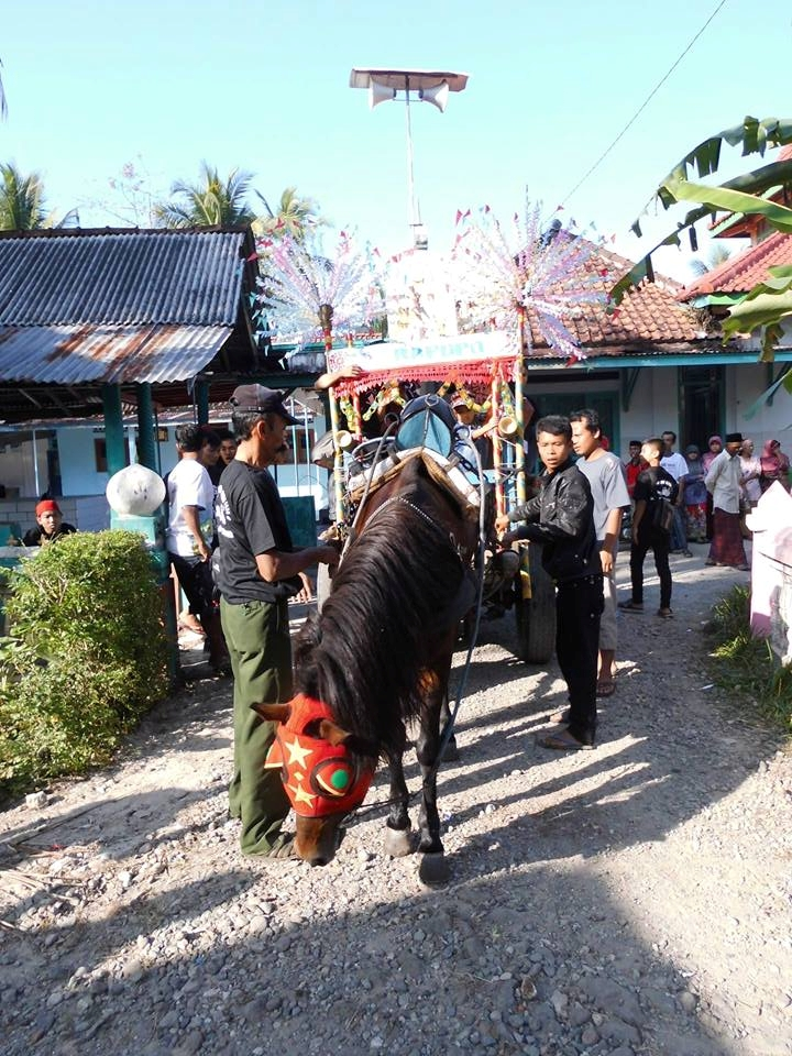 Tradisi Gerobagan IndrosariBanjaran, kebumen